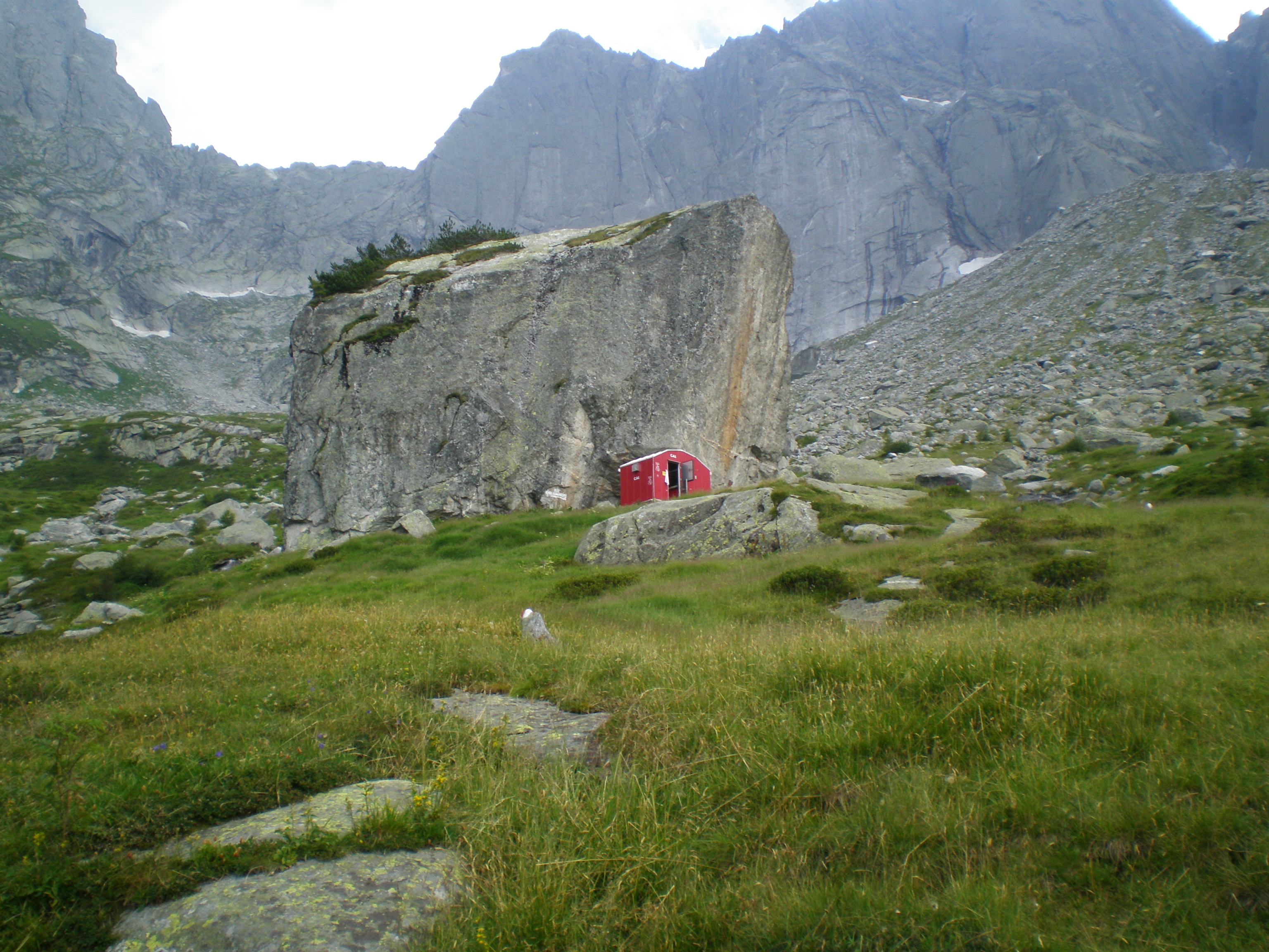 Lumbaart: El Sass Carlasc, in de la Val Codera (Lombardia).